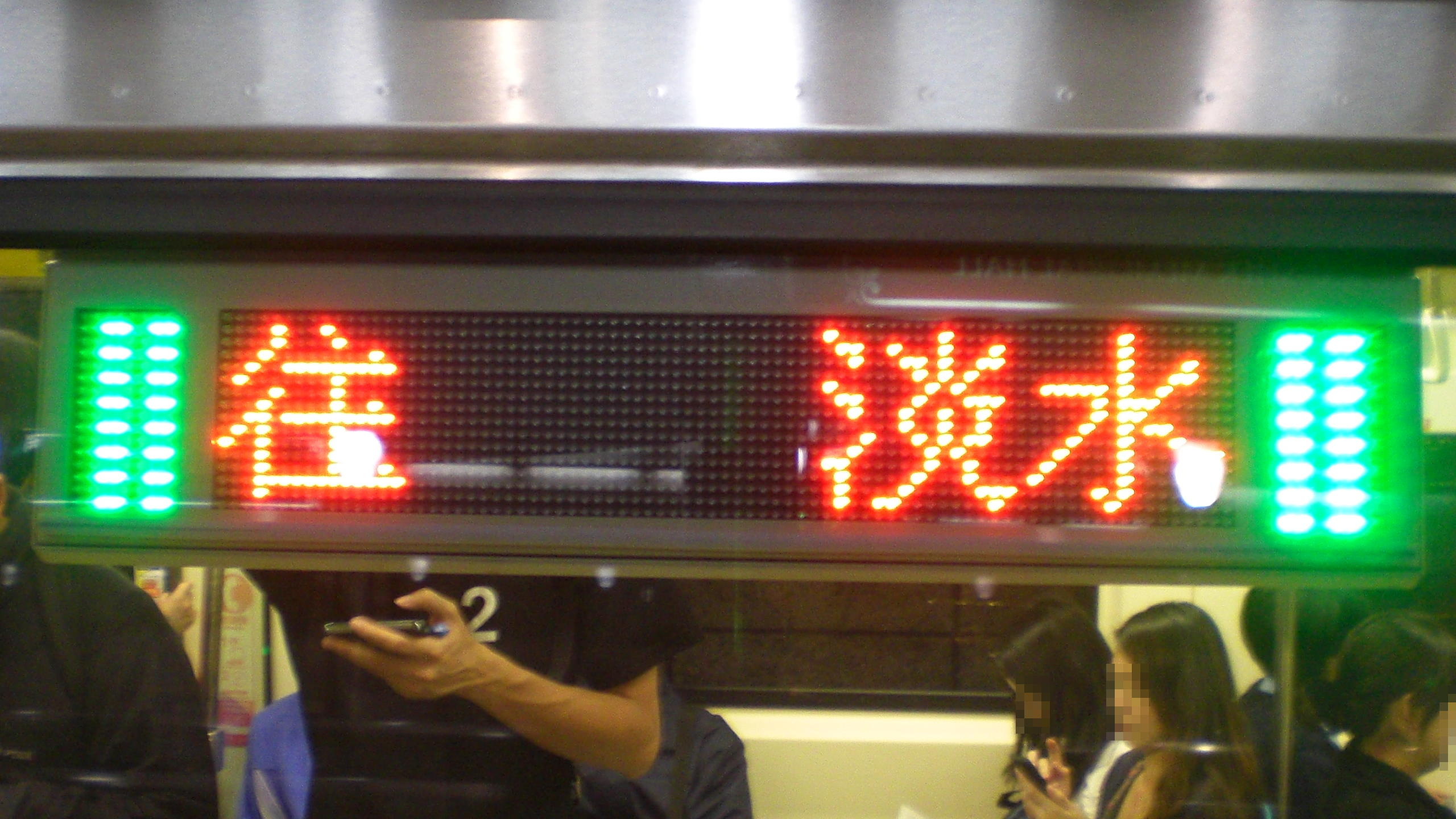 台北捷運381型電聯車車側目的地顯示器HT-MOD1040001-0142正面顯示中文終點站名